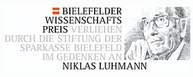 Logo des Bielefelder Wissenschaftspreises